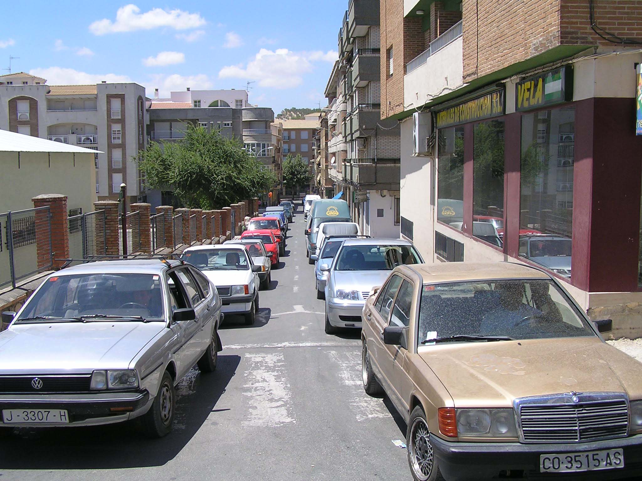 Volkswagen Passat B2 and Mercedes-Benz W201.